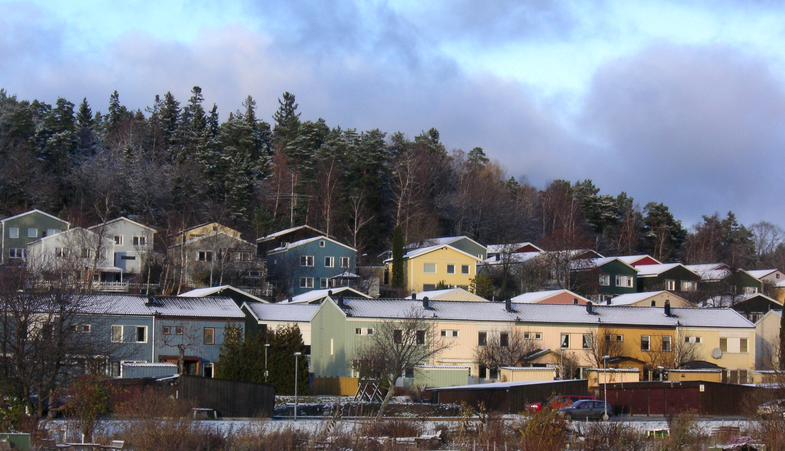 Slagsta i Botkyrka kommun Sverige